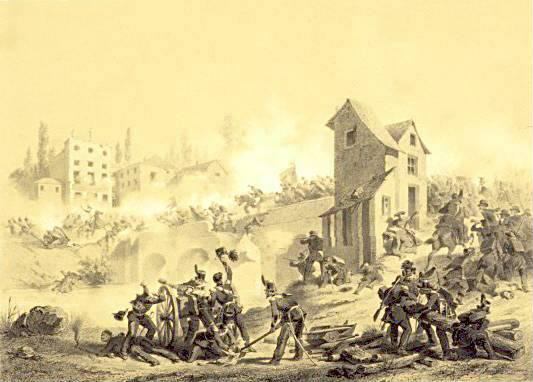 Primo combattimento di Goito (o battaglia del Ponte di Goito) dell'8 aprile 1848, ridotto, ritoccato, litografia